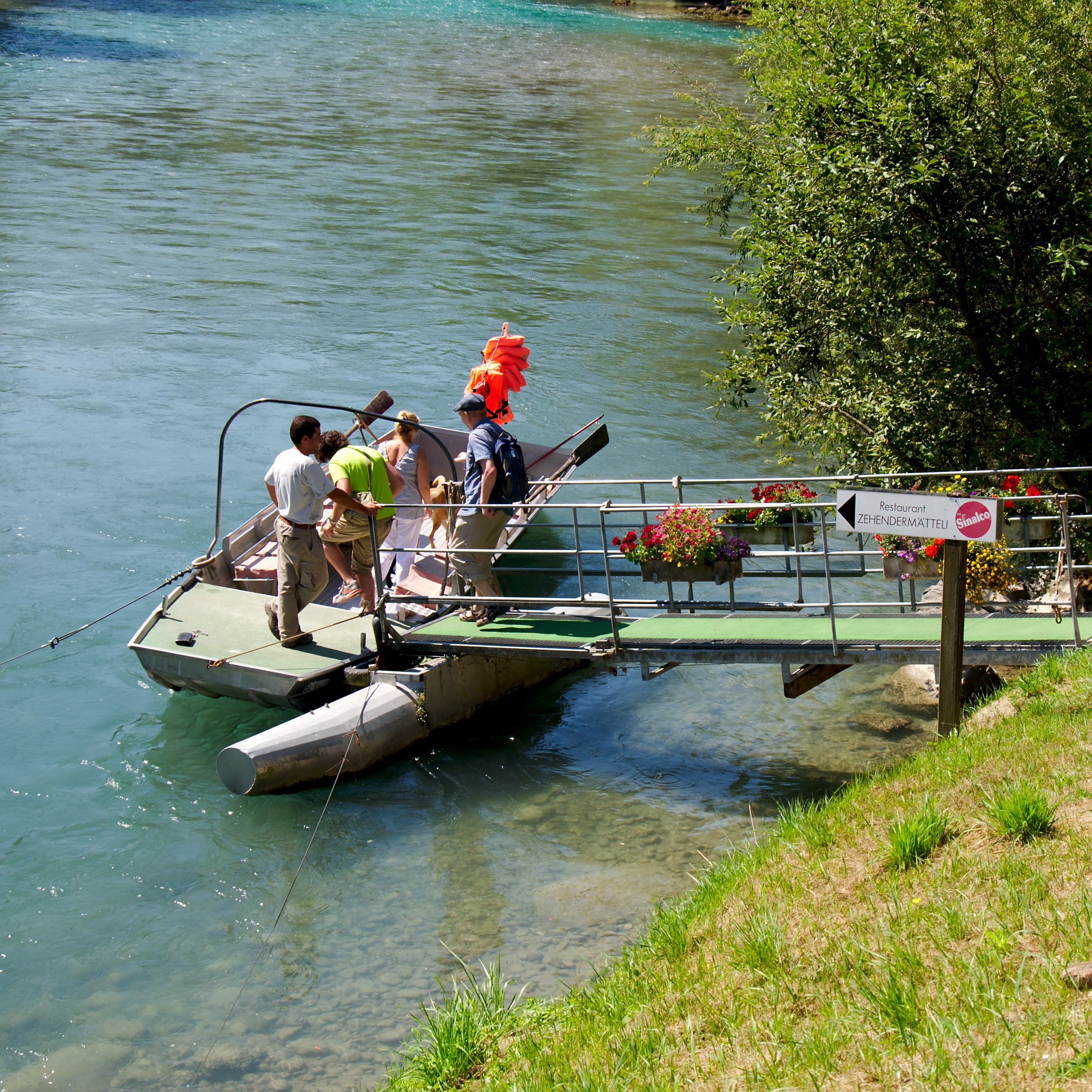 Die Zehendermättelifähre zwischen Bern und Bremgarten